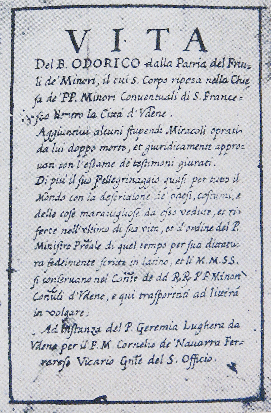 Strona tytułowa Żywotu bł. odoryka z Pordenone. Wyd. w 1891.